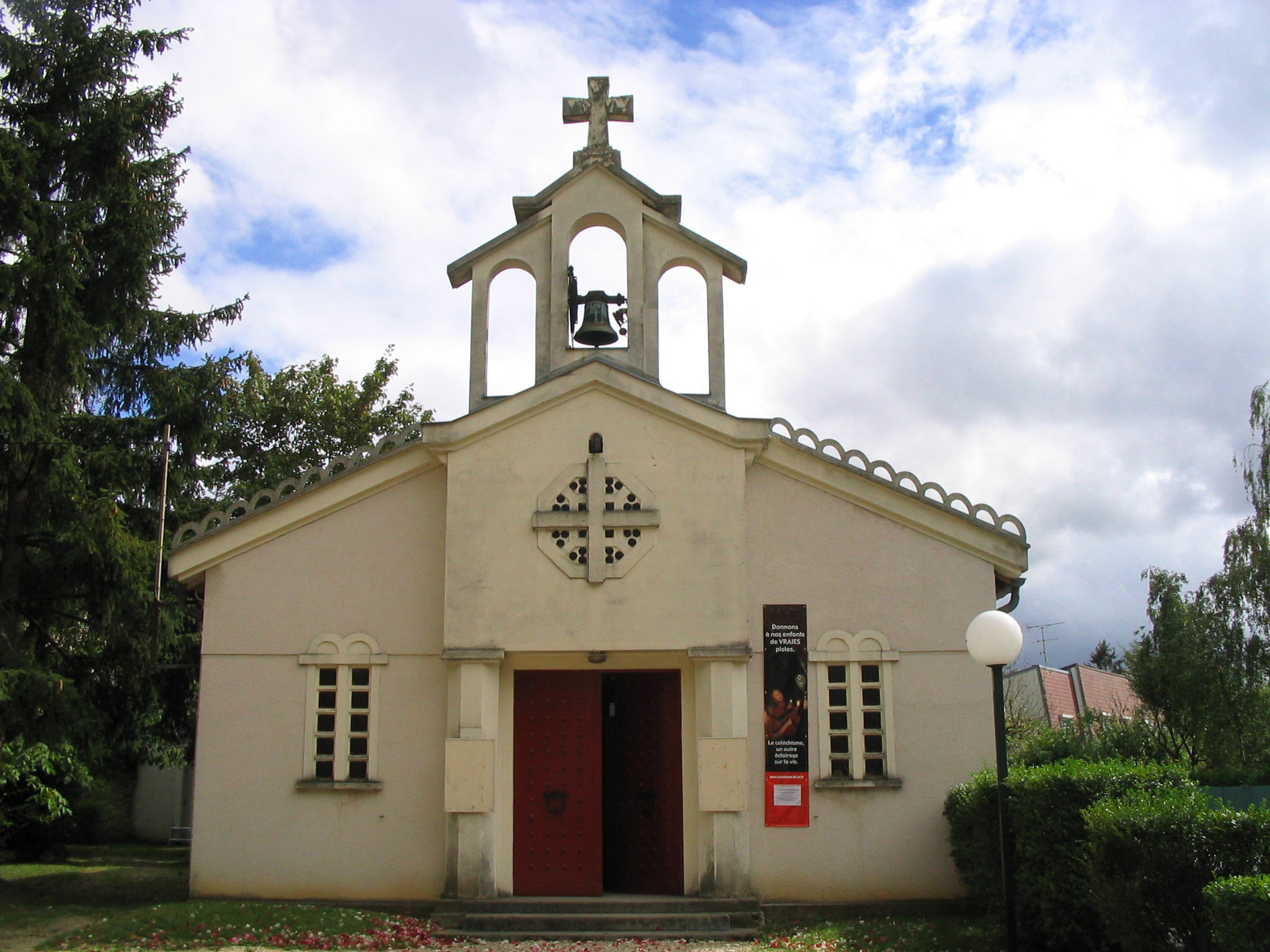 La nouvelle église de Cesson(Seine-et-Marne). New church of Cesson (Seine-et-Marne). Auteur/author:User:Tej